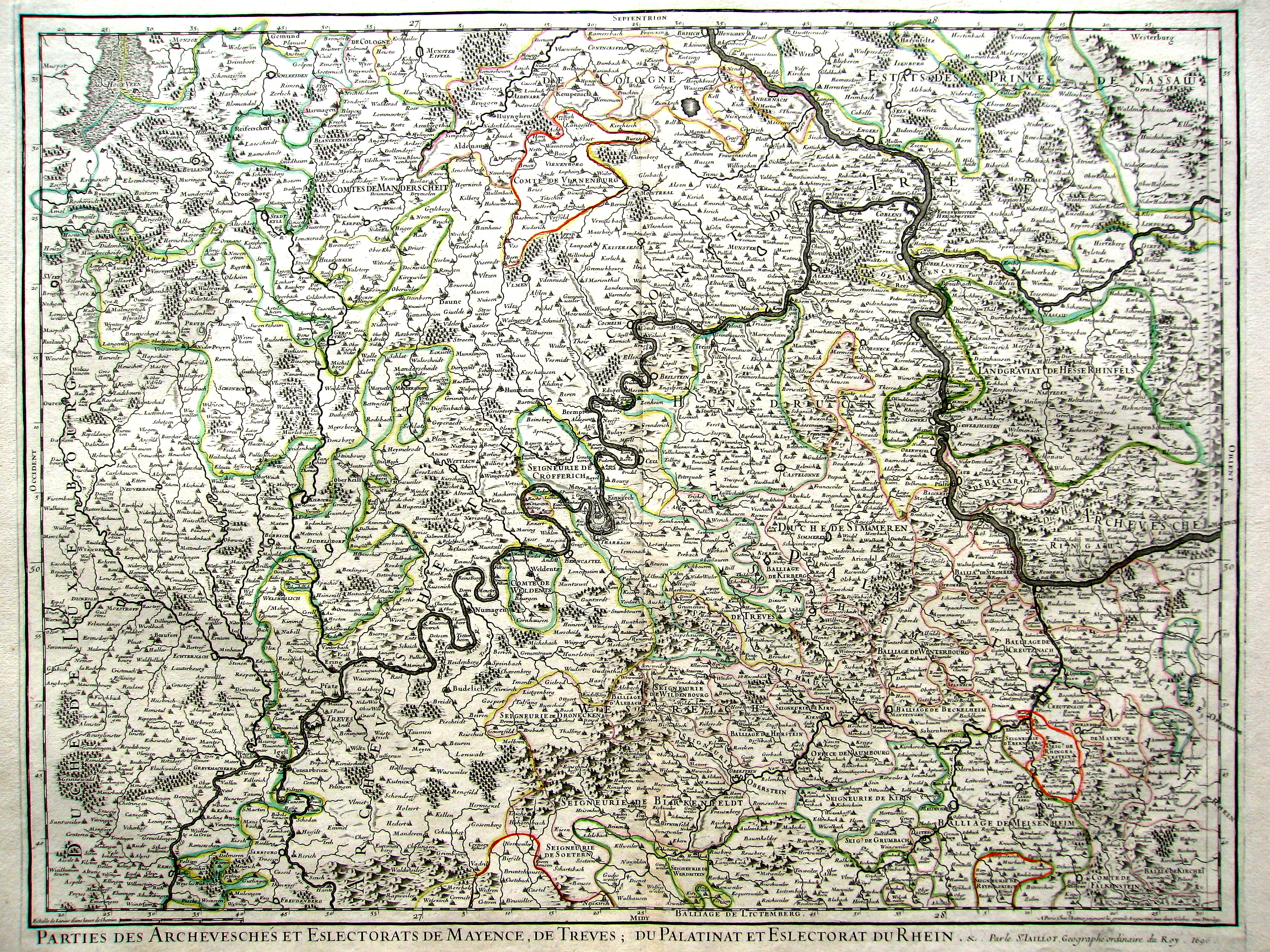 Parties Des Archévechés et Electorats De Mayence, De Treves, Du Palatinat et Electorat Du Rhein & c. : [Gewidmet] Par le S.r Jaillot, Geographe ordinaire du Roy, 1696 avec Privilege.